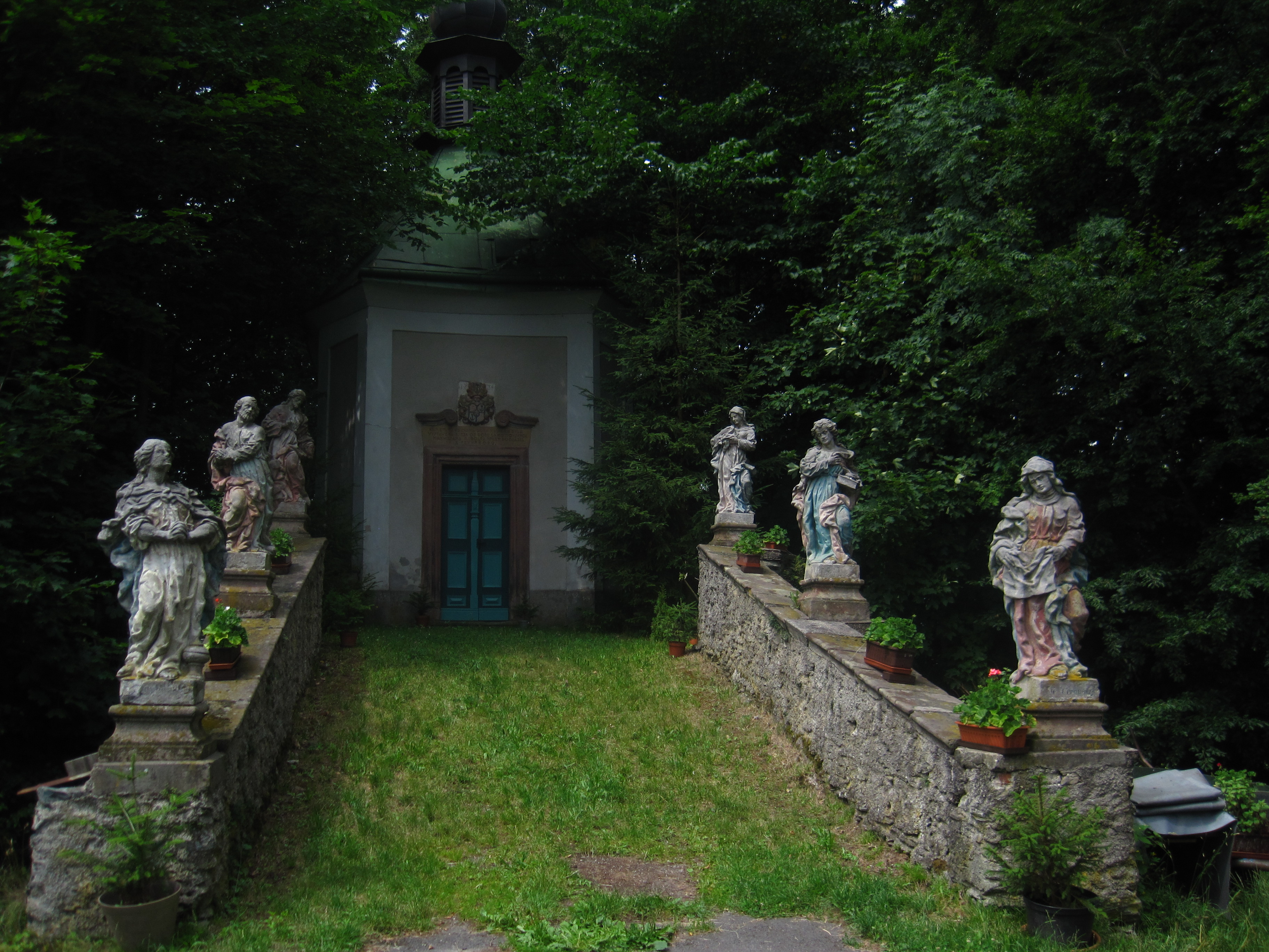 Kaple Povýšení svatého Kříže, hřbitov, Jesenný.